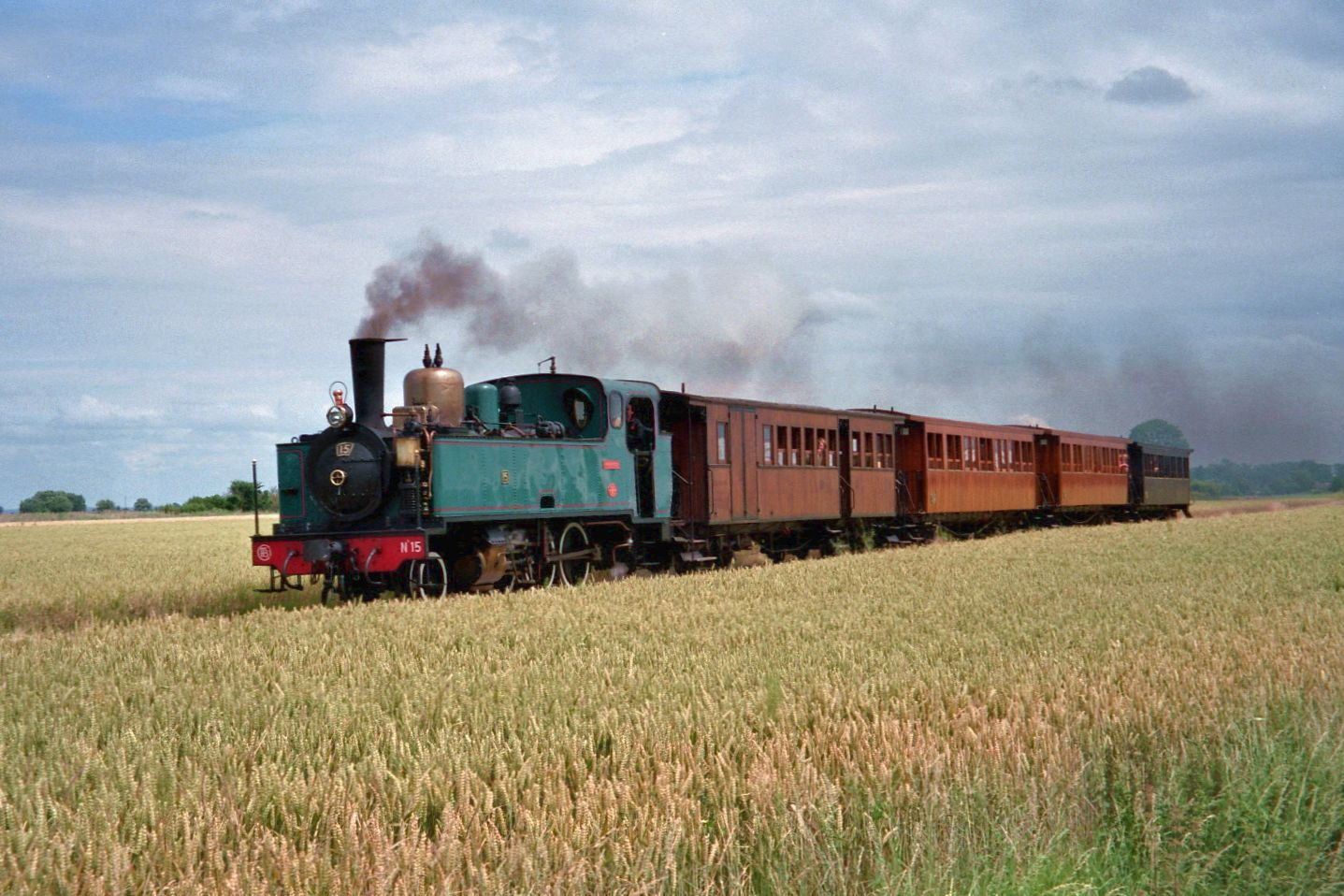 La 130T Haine-St-Pierre n° 15 approche de Cayeux avec son train en provenance de St-Valery, près du PN avec le chemin rural dit de la Mare Génon.